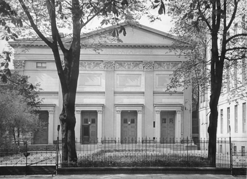 Berlin; Sing-Akademie Motiv: 150 Jahre Singakademie in Berlin. Am 24. Mai 1941 kann die Berliner Sing-Akademie auf ihr 150jähres Bestehen zurückblicken. Sie wurde im Jahre 1791 durch Karl Friedrich Fasch, den Hofzembalisten Friedrichs des Großen, mit 27 Sängern ins Leben gerufen. Dessen Nachfolger wurde Karl Friedrich Zelter, der in seinem Briefwechsel mit Goethe das bedeutende Chorunternehmen, das seit seinem Bestehen edelste Musik pflegte, mehrmals erwähnt. Auf Zelters Veranlassung entstand auch das nach Entwürfen von Schinkel, das unser Bild zeigt.